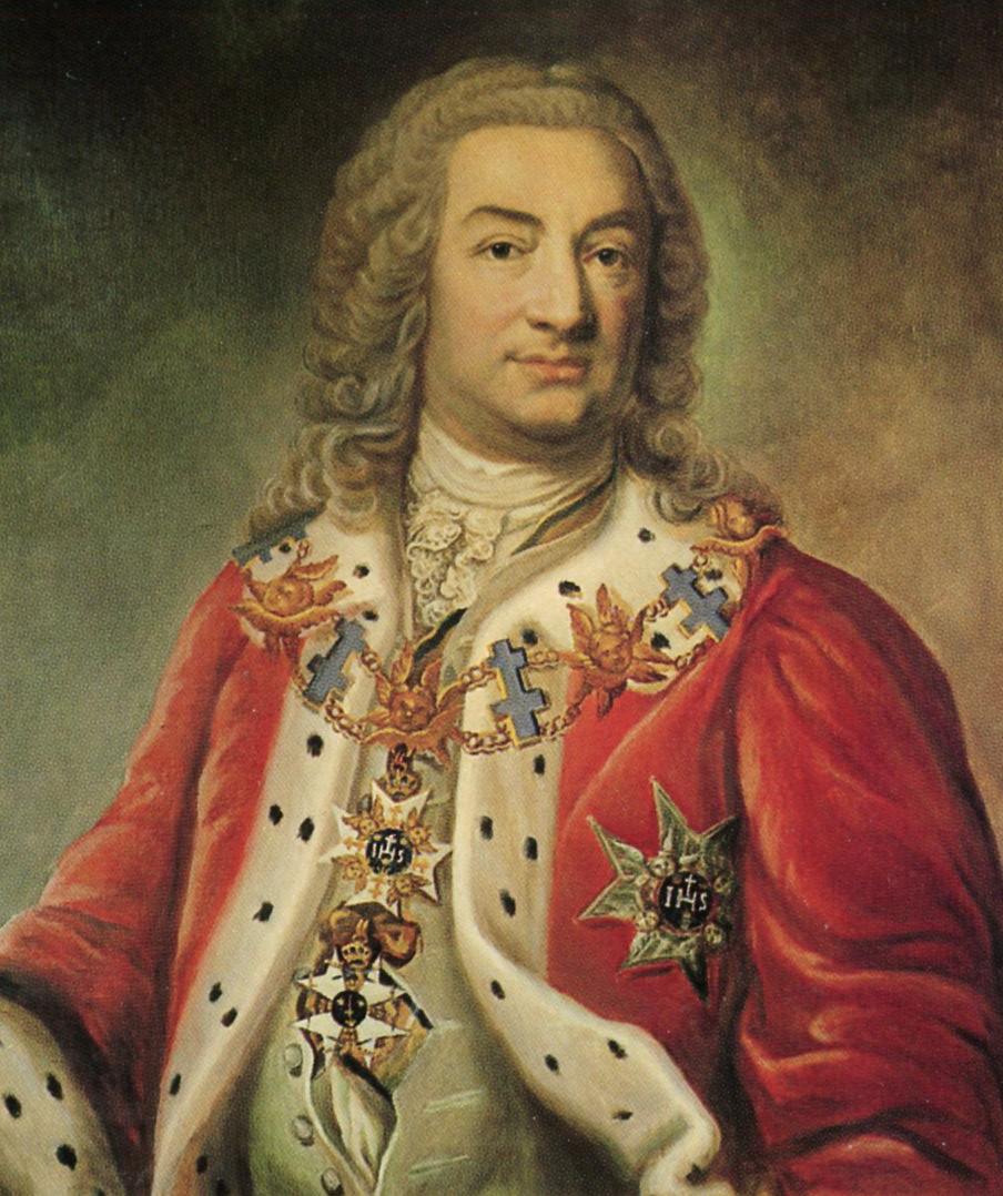 Axel Lagerbielke (1703-1782) viceamiral och riksråd